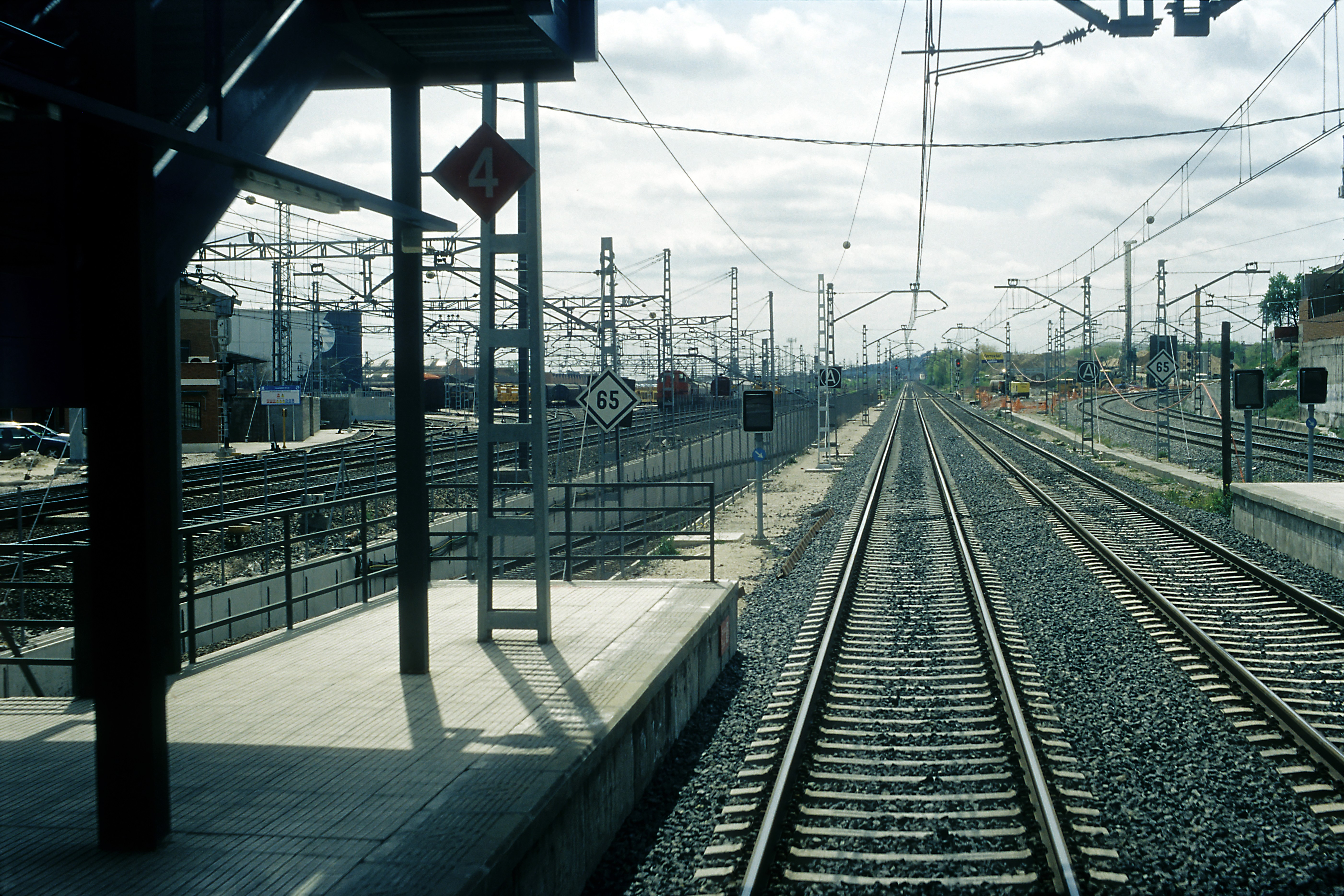 Einer der Güterbahnhöfe von Madrid und Hauptumschlagplatz für Kraftfahrzeuge, insbesondere Pkw. Rückblick Richtung Aranjuez, nach rechts zweigt die Strecke Richtung Villaverde Alto mit S-Bahn-Abzweigung nach Parla und weiter nach Cáceres ab.